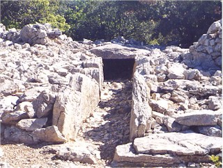 Description: Dolmen à couloir languedocien, Viols-le-Fort, 34Source: Hugo SoriaLicence: GFDL Hugo Soria